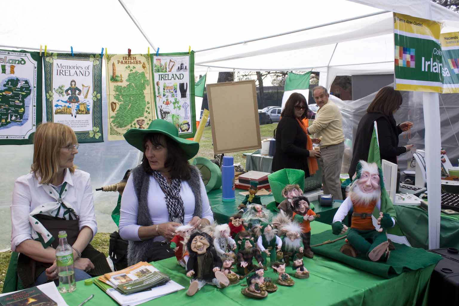 Dia del inmigrante 079